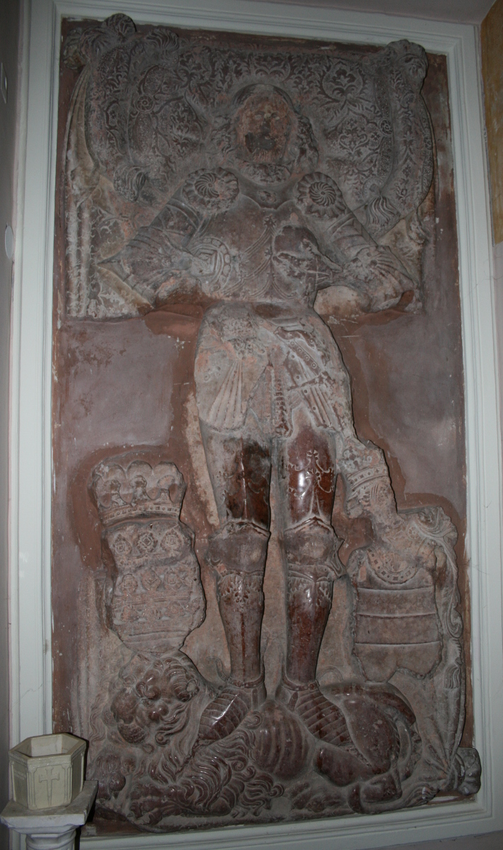 Nadgrobna ploča Nikole Iločkog (1410-1477), kralja Bosne, u Crkvi svetog Ivana Kapistrana u Iloku, Hrvatska Gravestone of Nikola Iločki (1410-1477), King of Bosnia, in the St. John of Capistrano Church in Ilok, Croatia